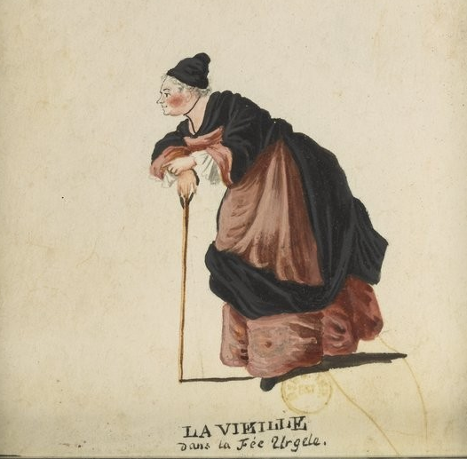 Justine Favart incarnant le personnage de la Vieille dans La Fée d'Urgèle d'Egidio Duni, paroles de Charles-Simon Favart (dessin sur vélin, gouache et encre, de Jean-Louis Fesch — BnF, Costumes de Théâtre).